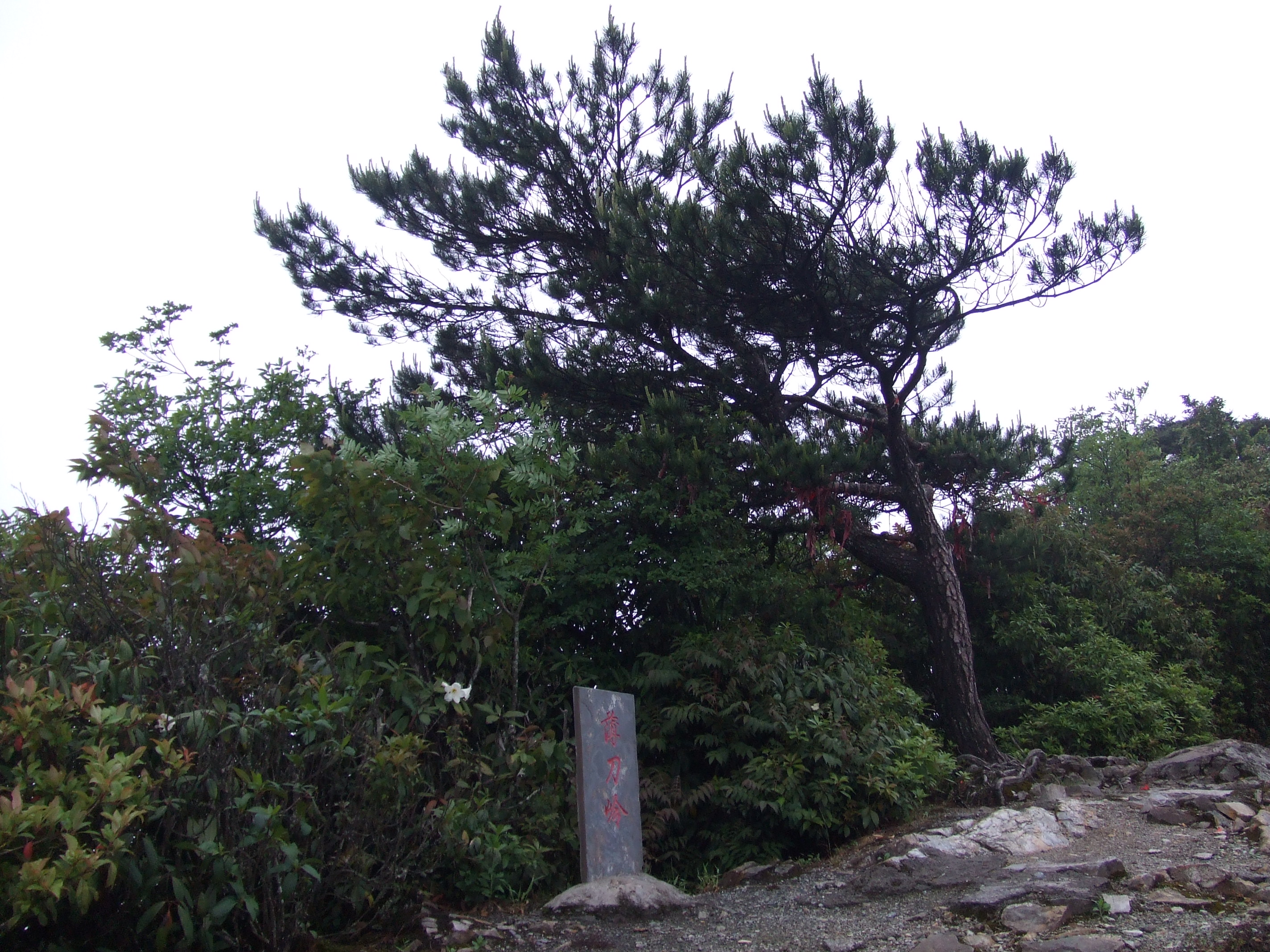 贵州-梵净山-薄刀岭